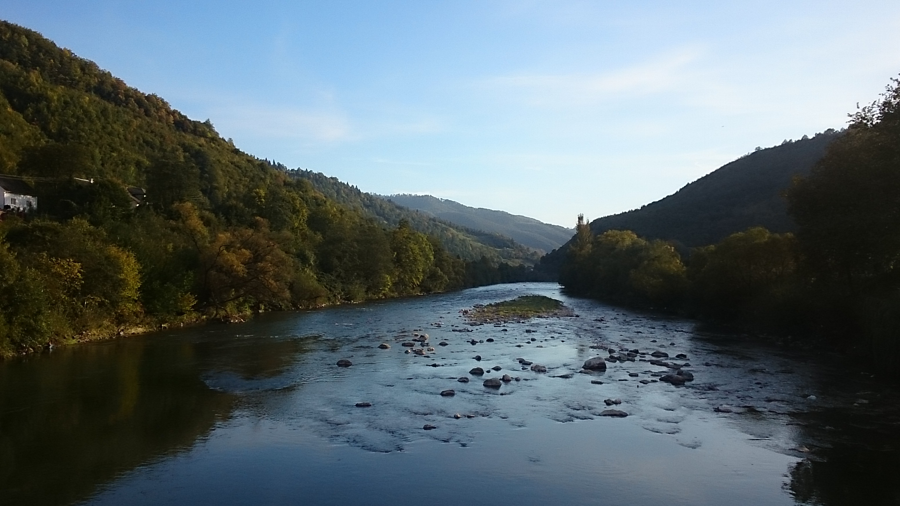 Тиса в районе села Деловое, Раховский район, Закарпатье